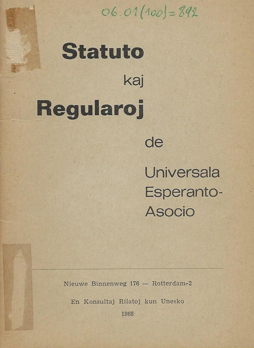 librokovrilo de "Statuto_kaj_Regularoj de Universala Esperanto-Asocio", 1968